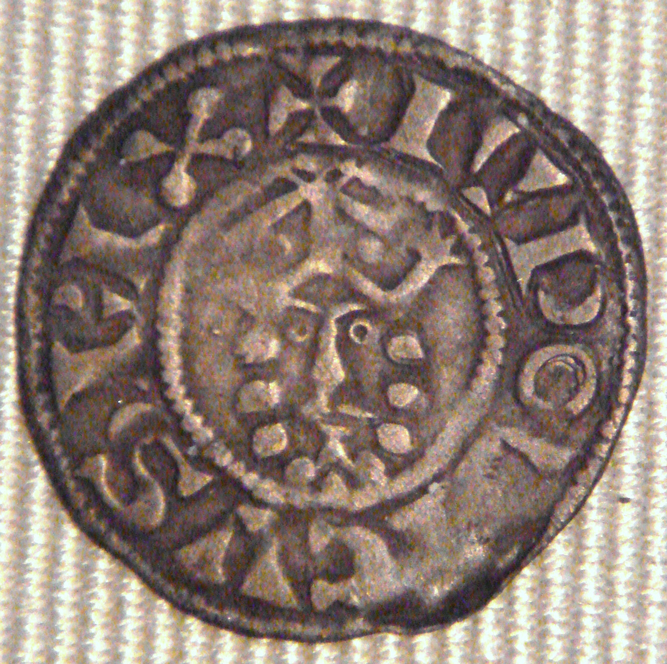 Louis_VII_denier_Bourges_1137_1180